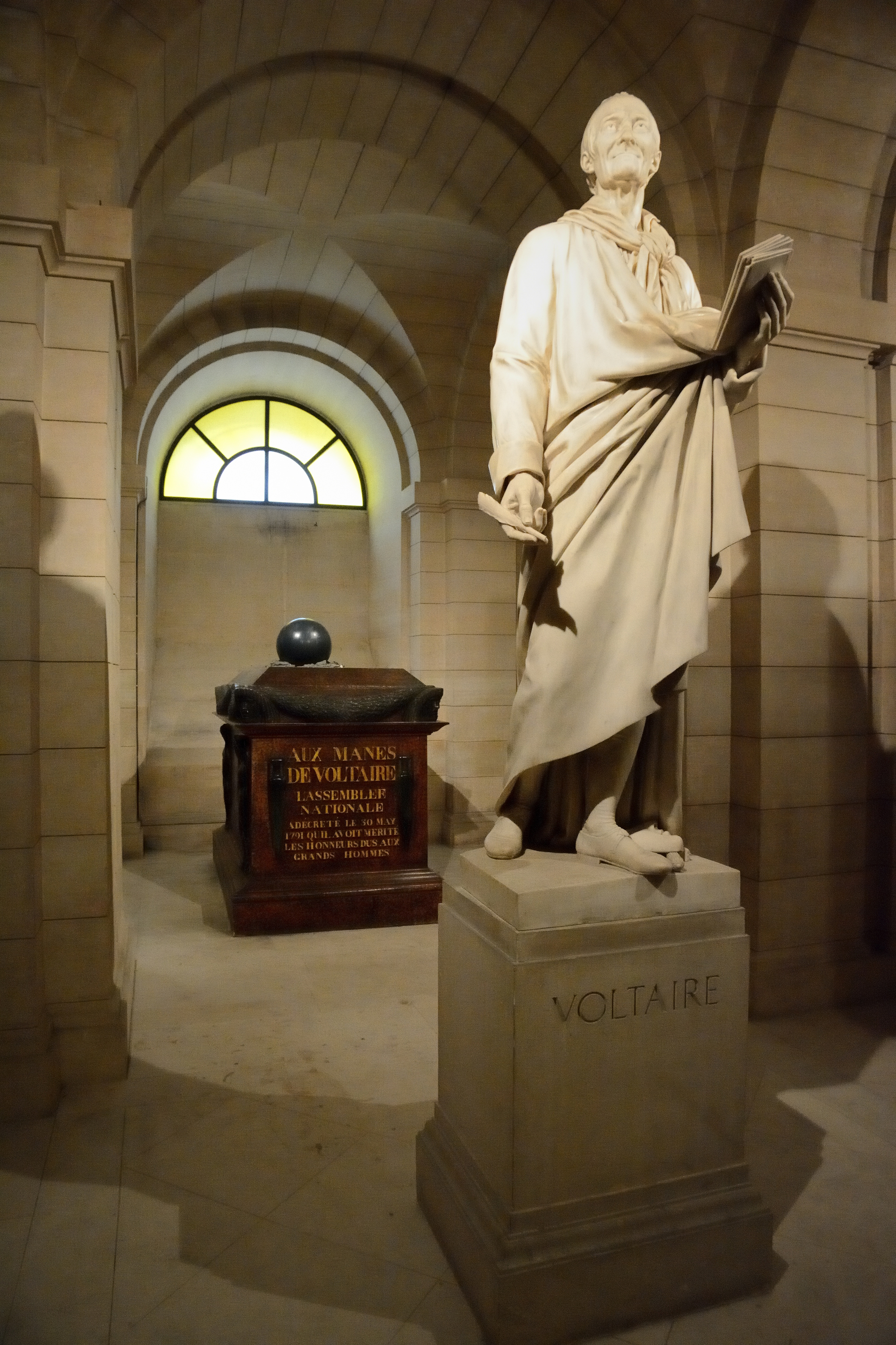 Panthéon, Statue et tombe de Voltaire (Classé)